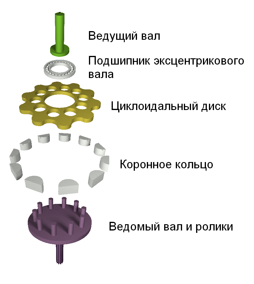 Описание сост. частей циклоидального редуктора